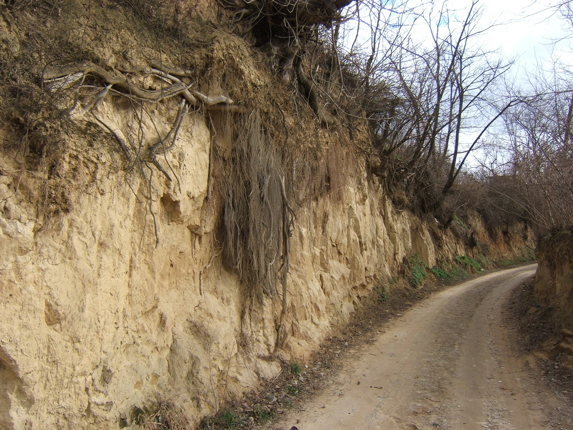 Löszmélyút a kaposvári Ivánfahegyen